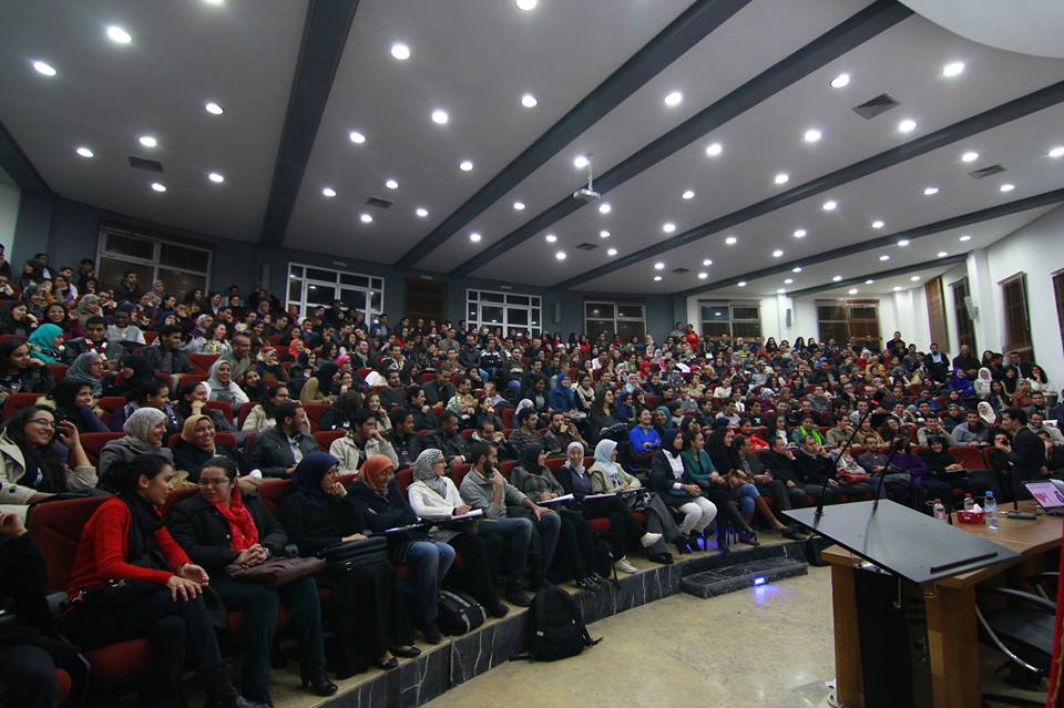 L'Amphirouge où sont tenues toutes les conférences et soutenances.